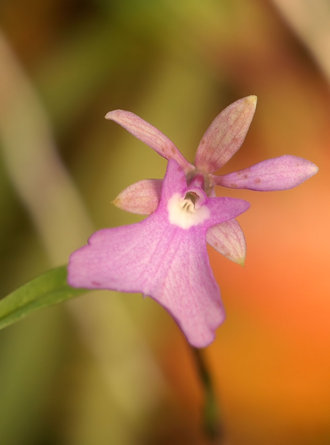 Epidendrum centropetalum - flower